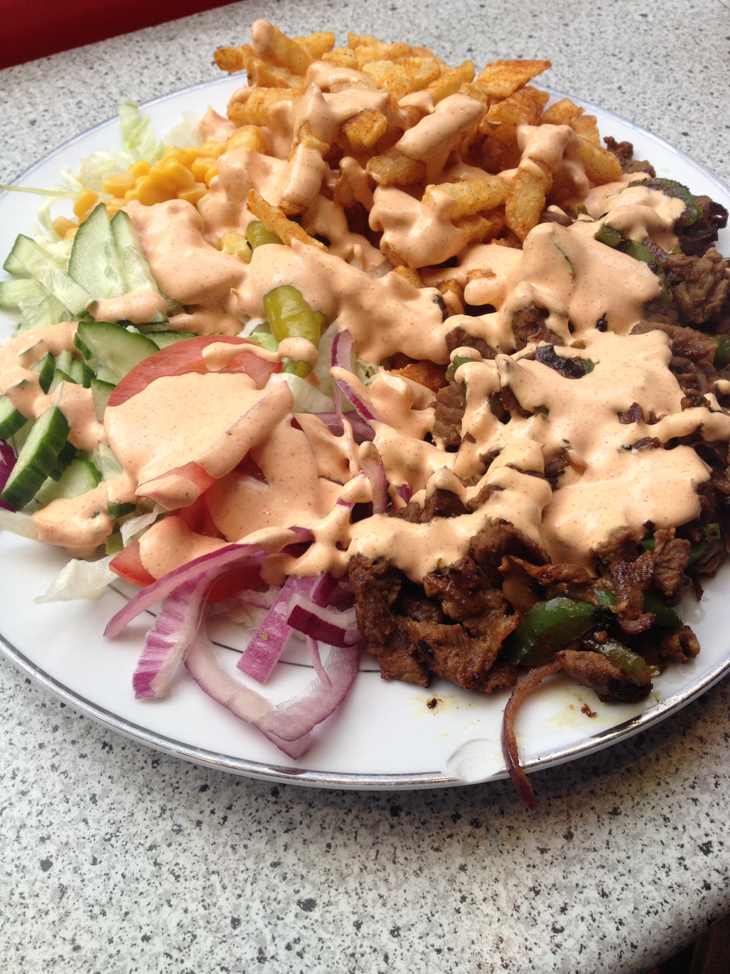 Biffsnadder